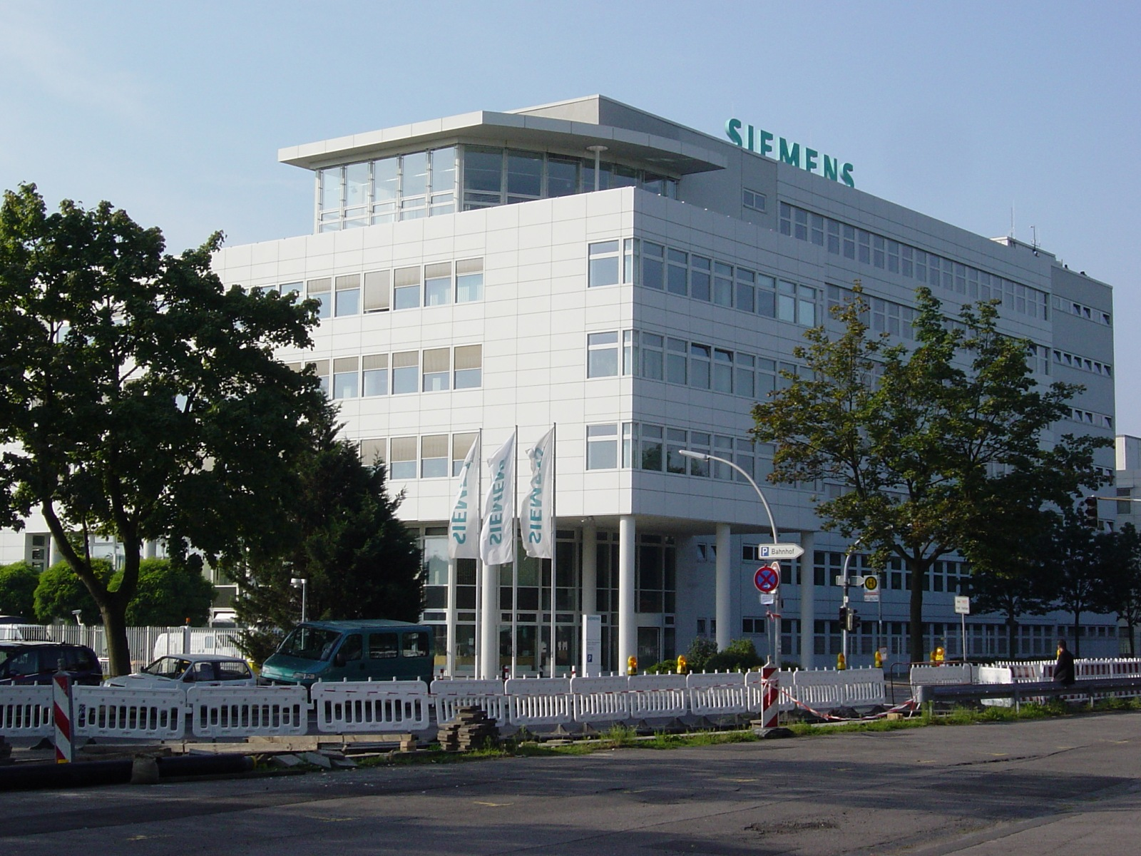 Siemens AG, Mobility Division, Eingang Mitte, Ackerstr. 22, 38126 Braunschweig, Haltestelle Hauptbahnhof Süd